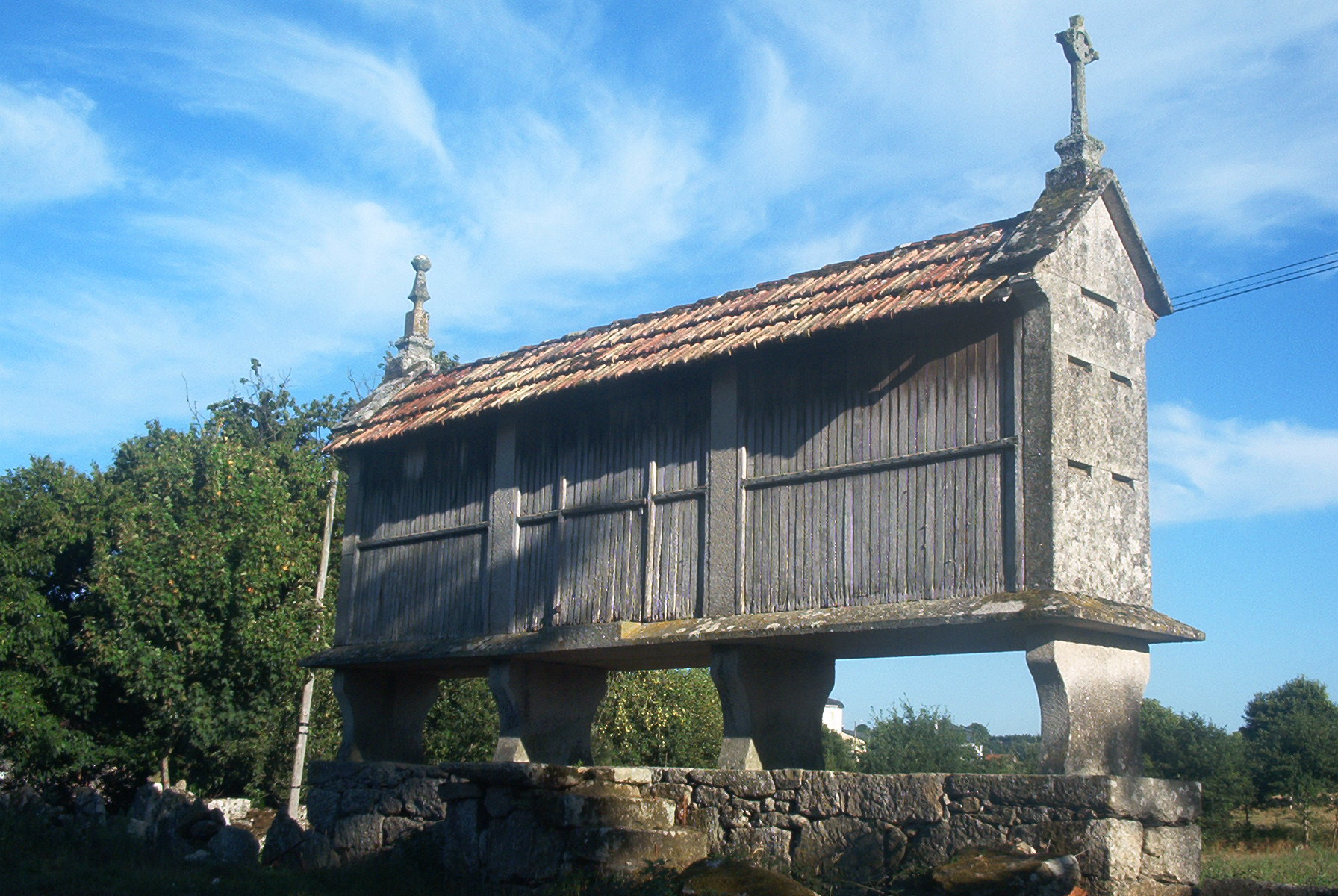 Hórreo en Vilaboa (Antas de Ulla)